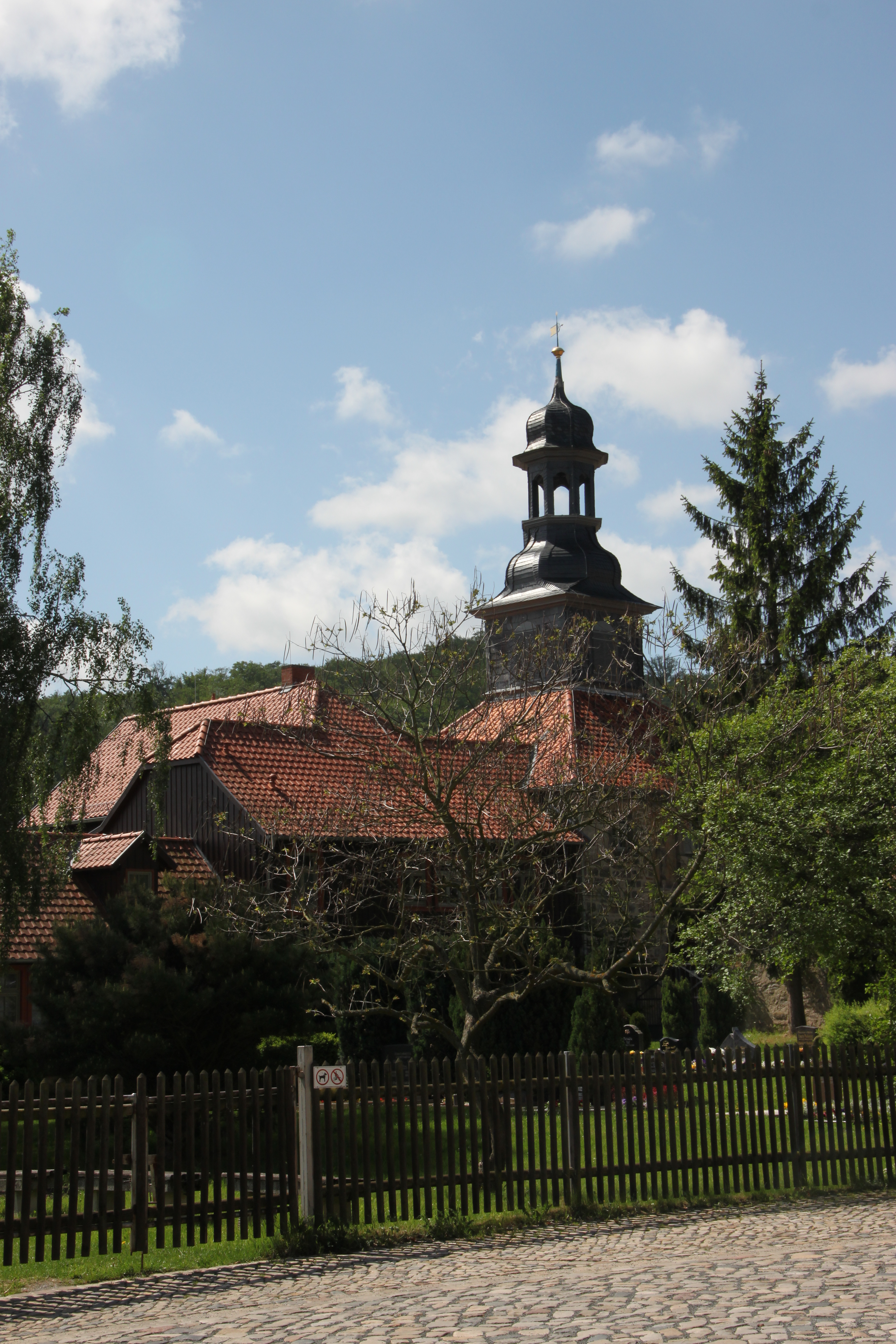 Kloster Michealstein